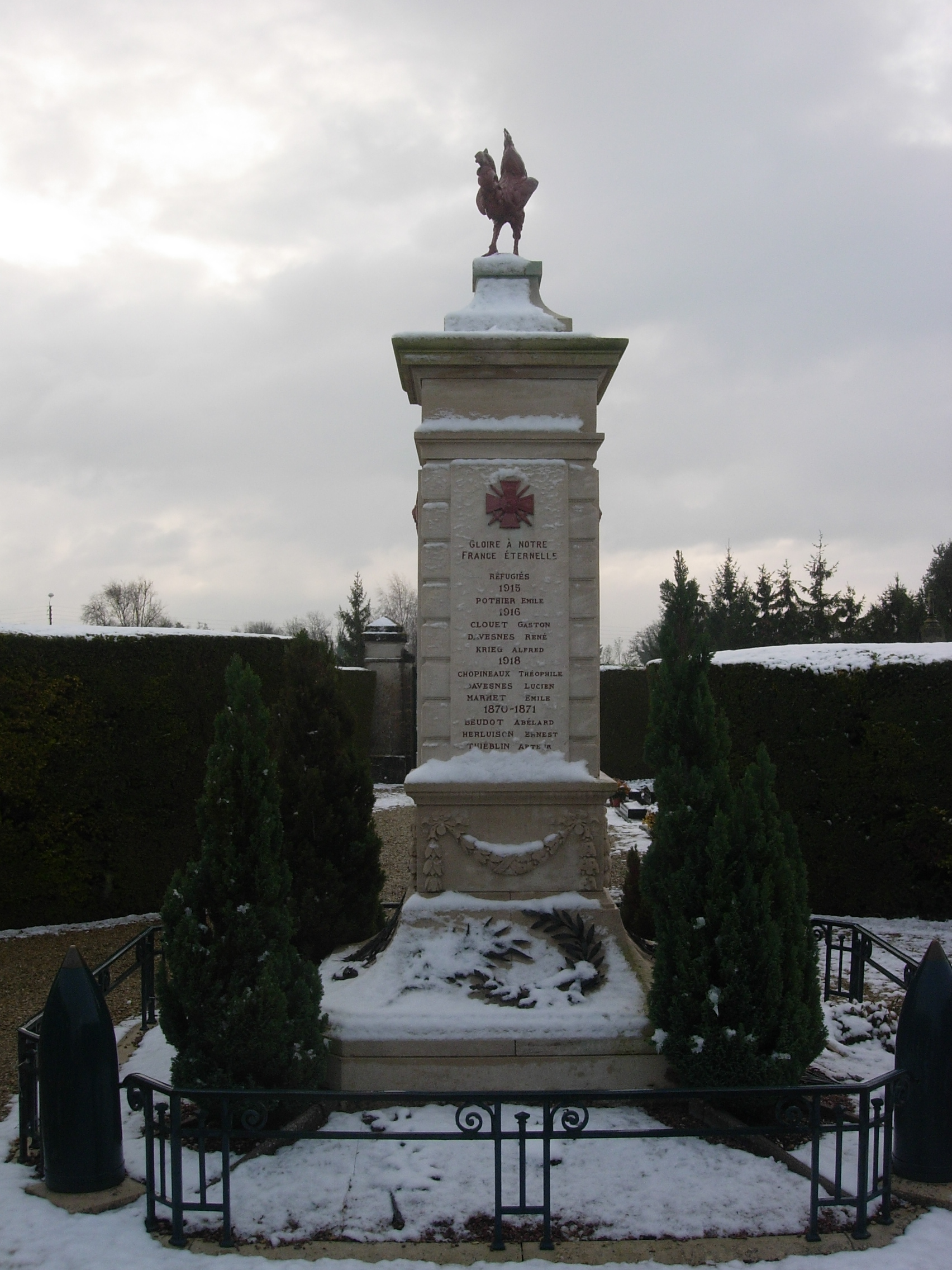 Monument aux morts surmonté d'un coq